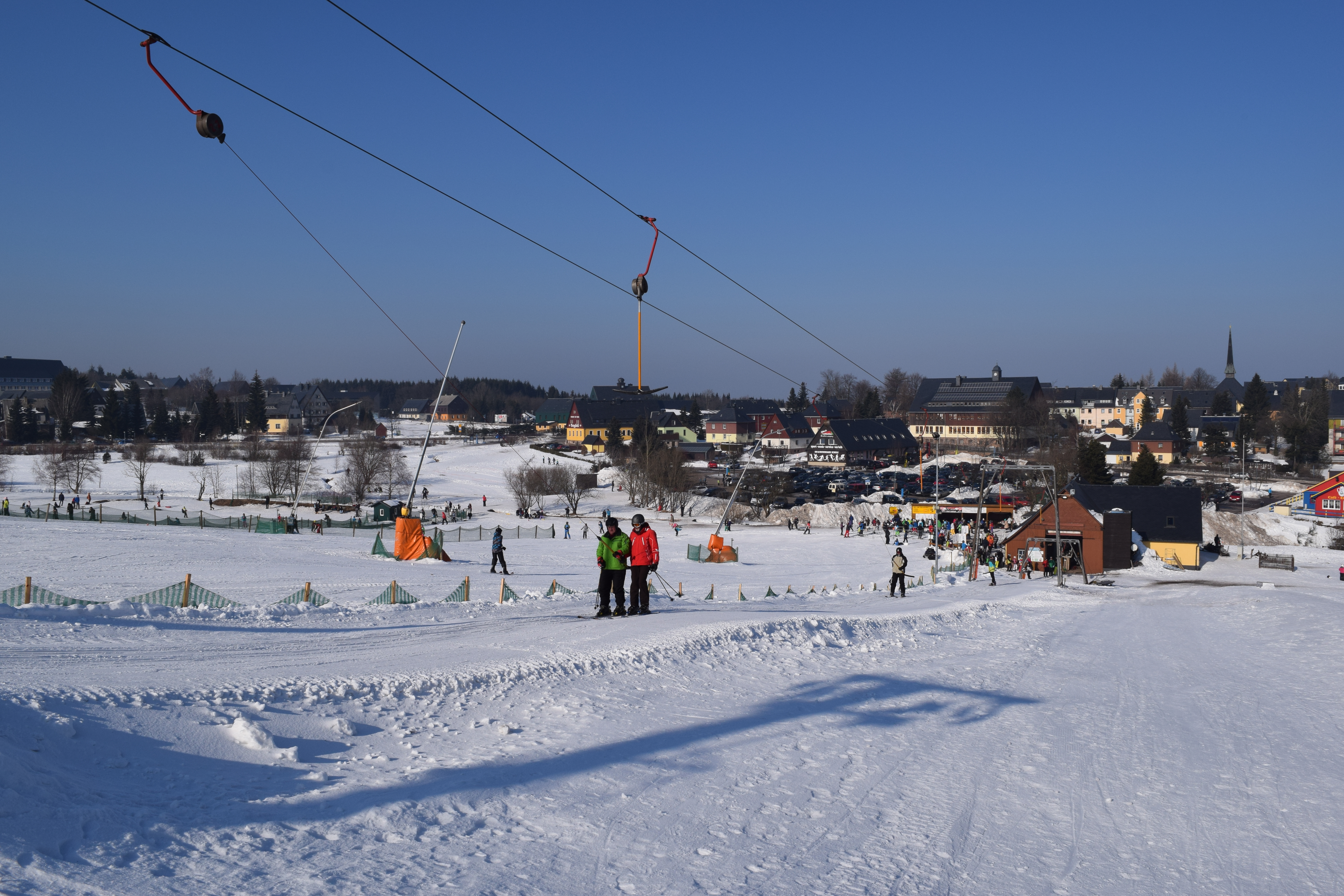 Piste Altenberg